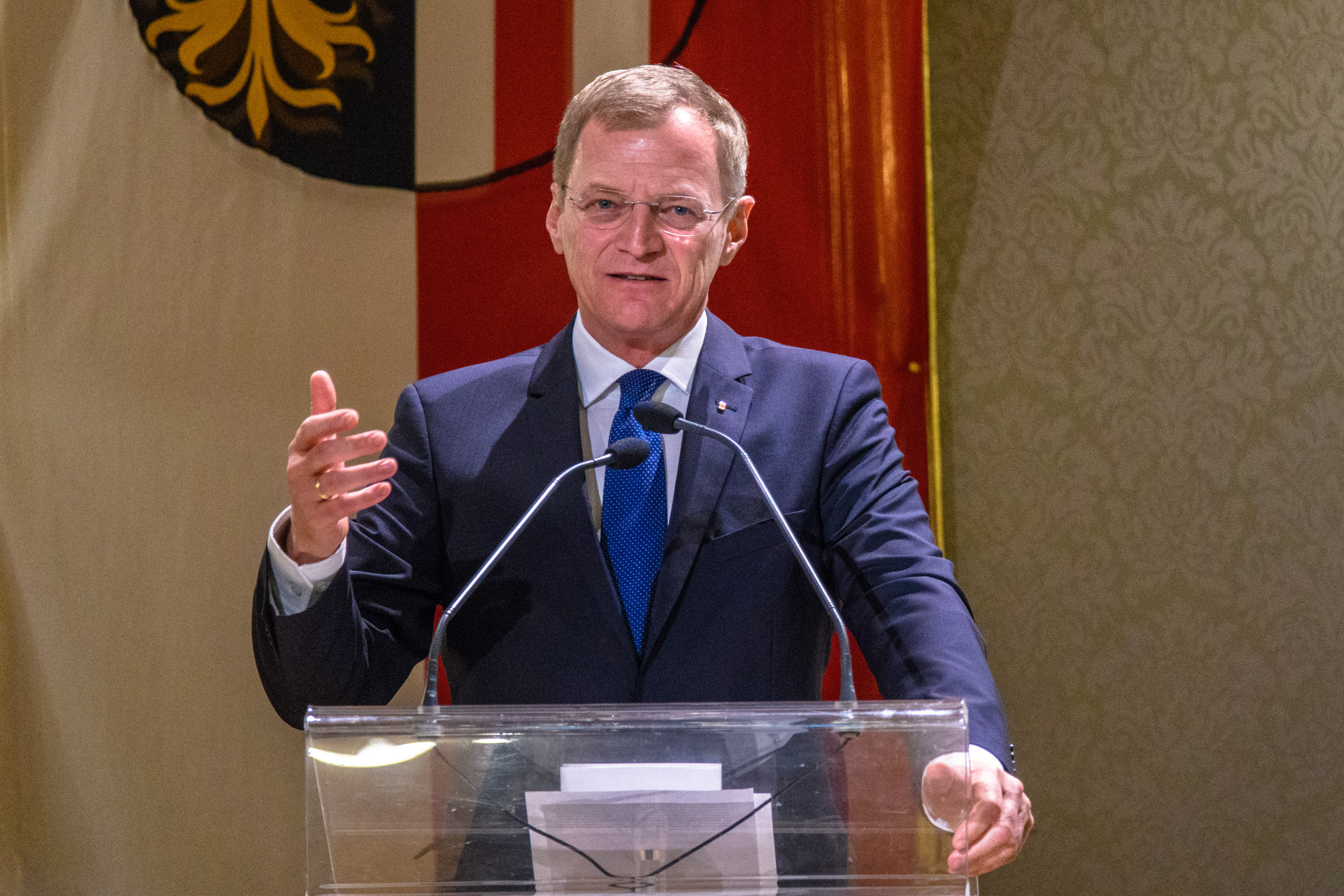 Verleihung des Heinrich-Gleißner-Preises 2018 am 14. Jänner 2019 in den Redoutensälen Linz